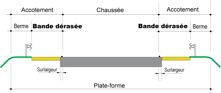 Terminologie routière – Bande dérasée